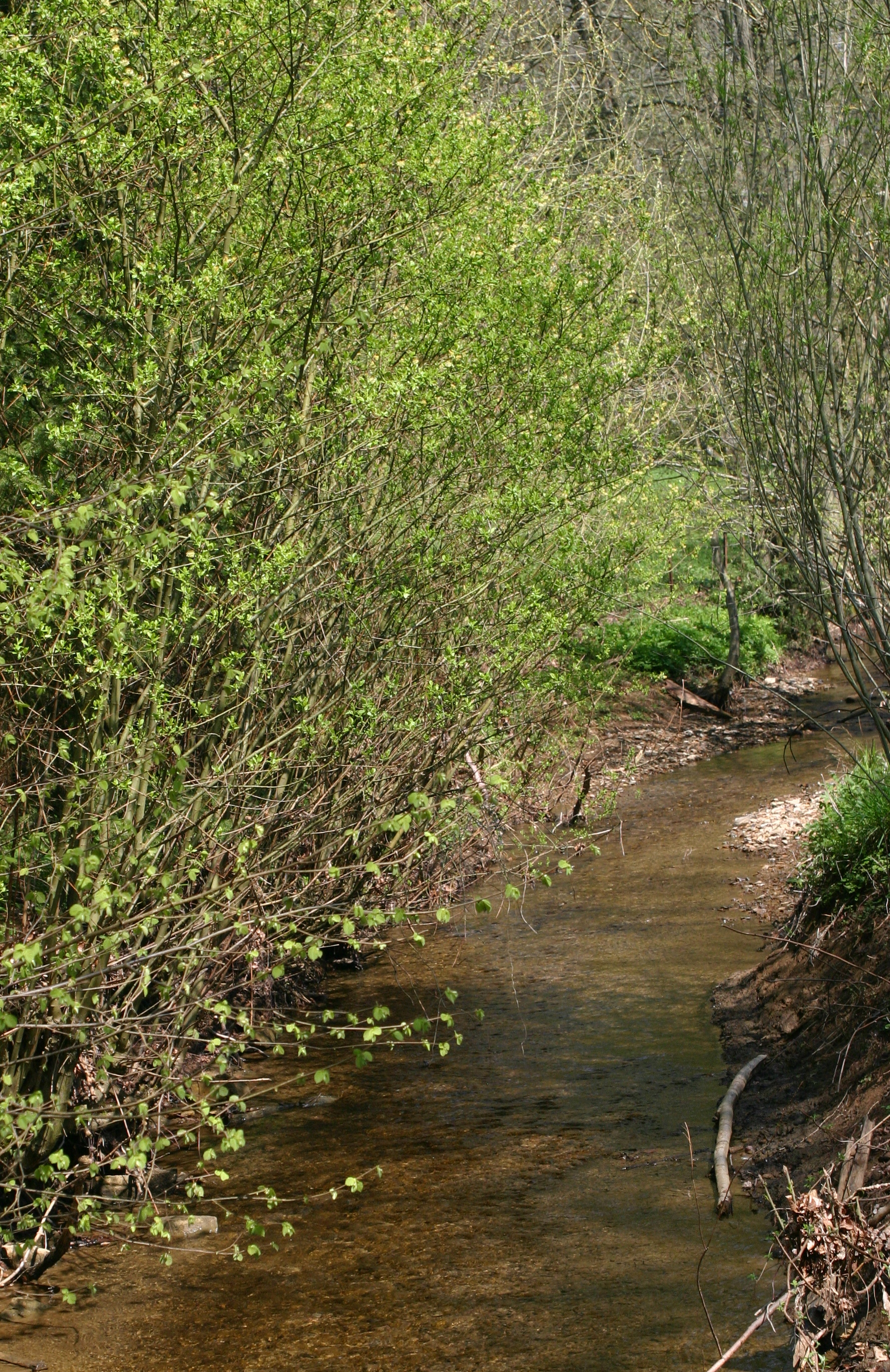 D'Mierbaach zu Uewerkäerjeng laanscht de Feldwee deen op Groussbéiwéng féiert.